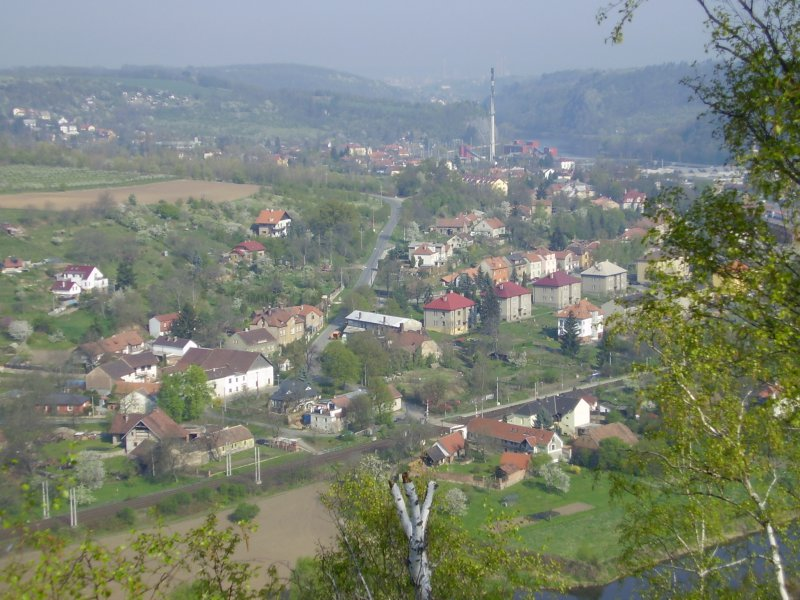 Letky - celkový pohled